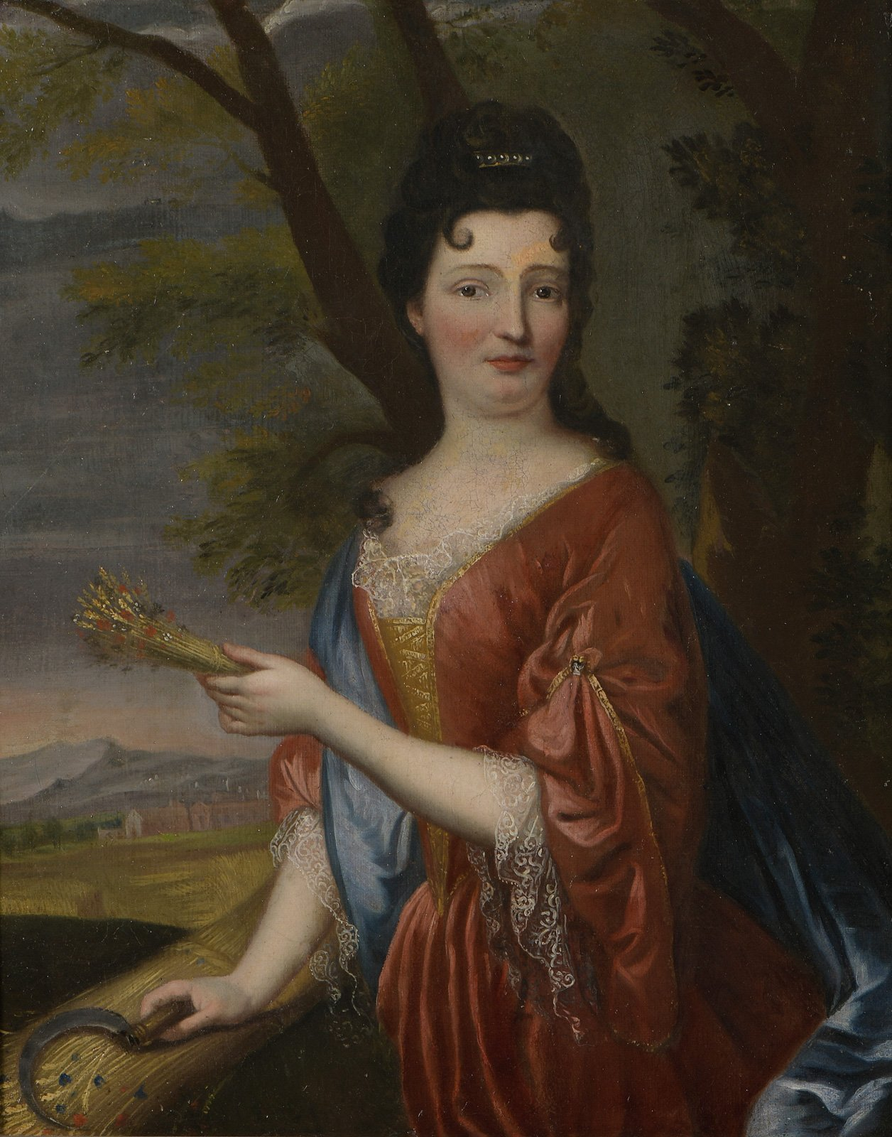 Portrait présumé de Madame de Marsan en Cérès